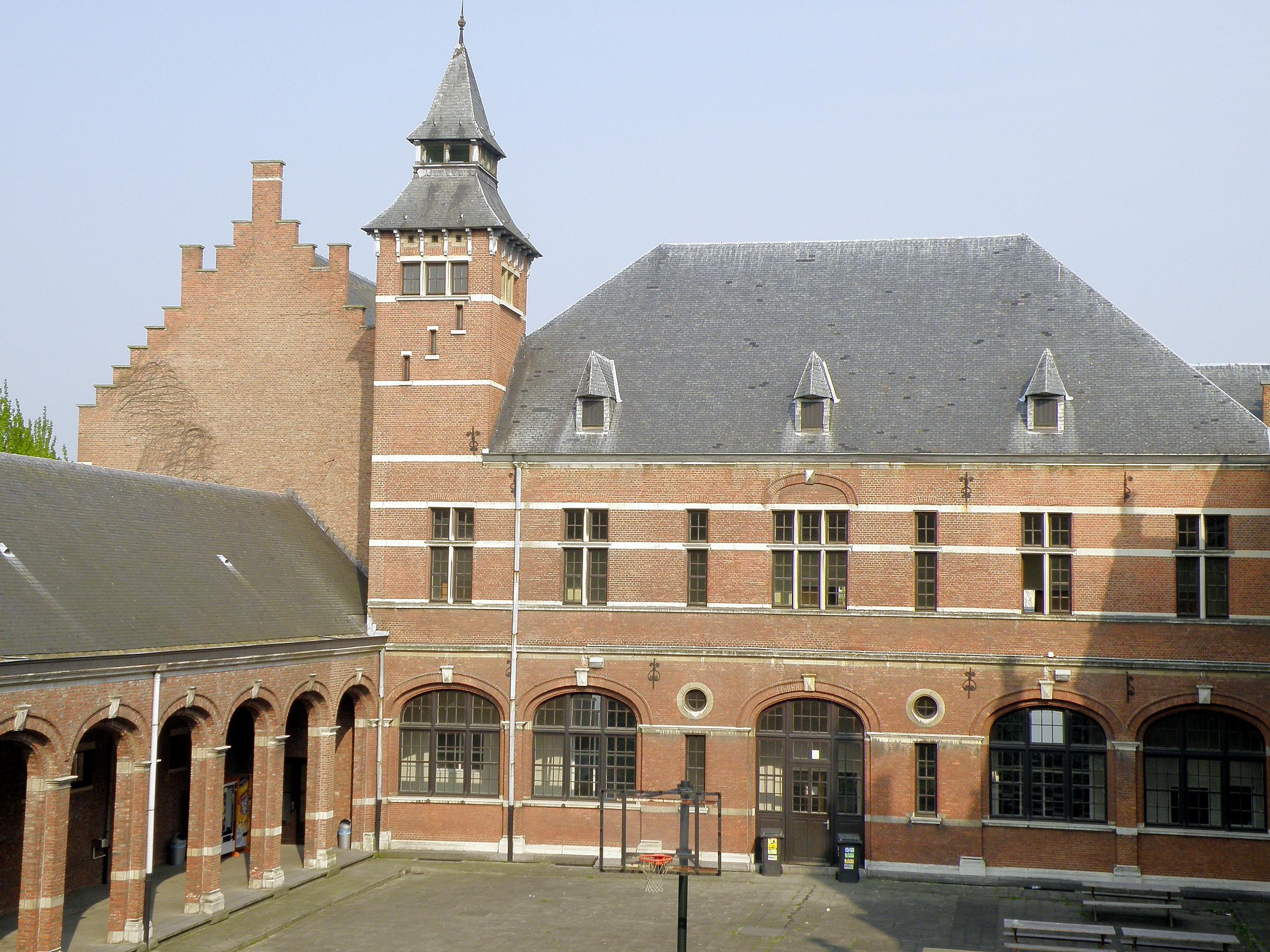 Antwerpen, district Antwerpen. Voormalig Jongensweeshuis aan de Durletstraat, thans hogeschool. Ontwerp van Henri en Leonard Blomme, 1881. Achterste vleugel van het binnenplein, met toren. Vgl. verder Inventaris Bouwkundig Erfgoed Vlaanderen.